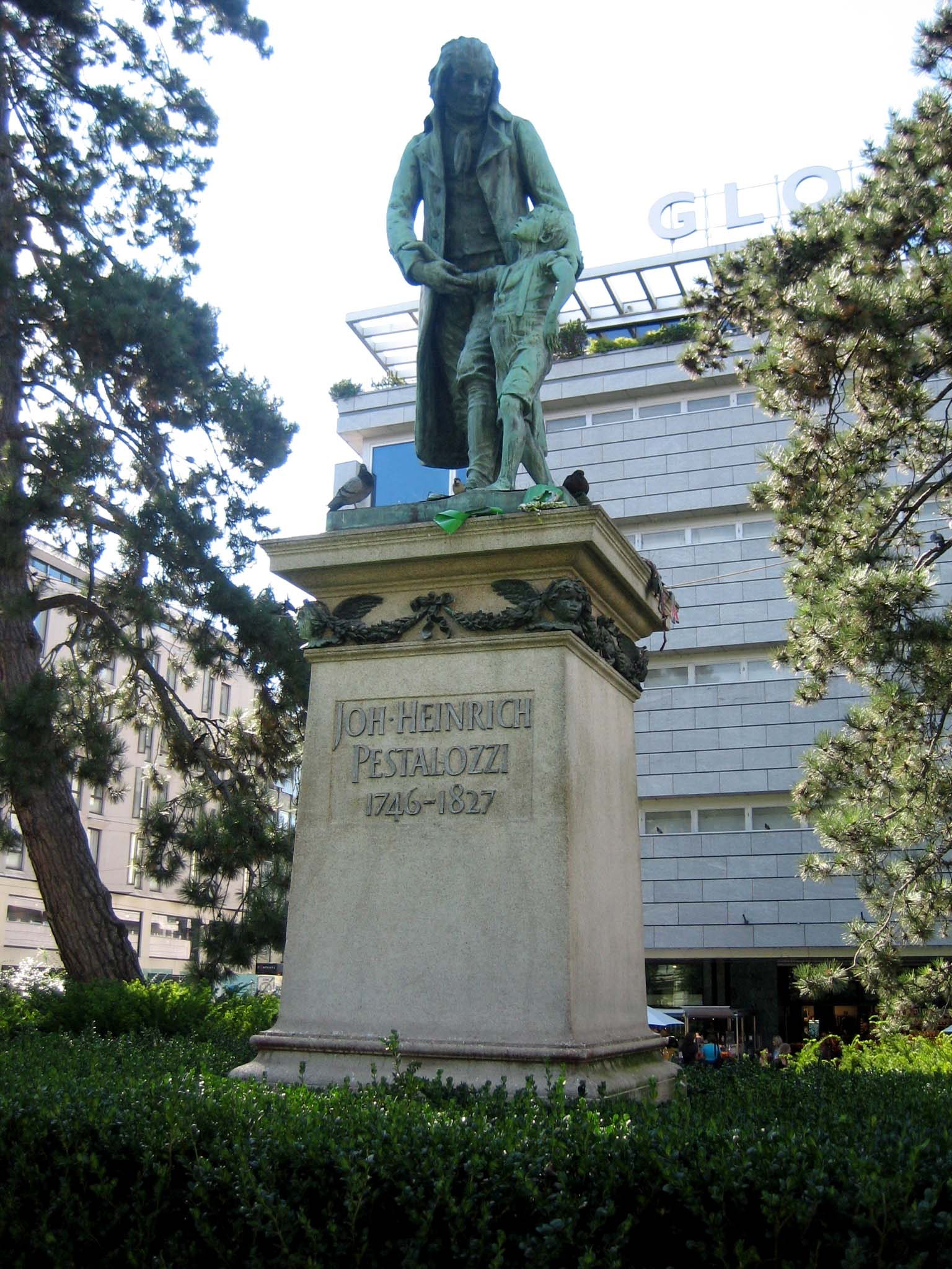 Pestalozzidenkmal